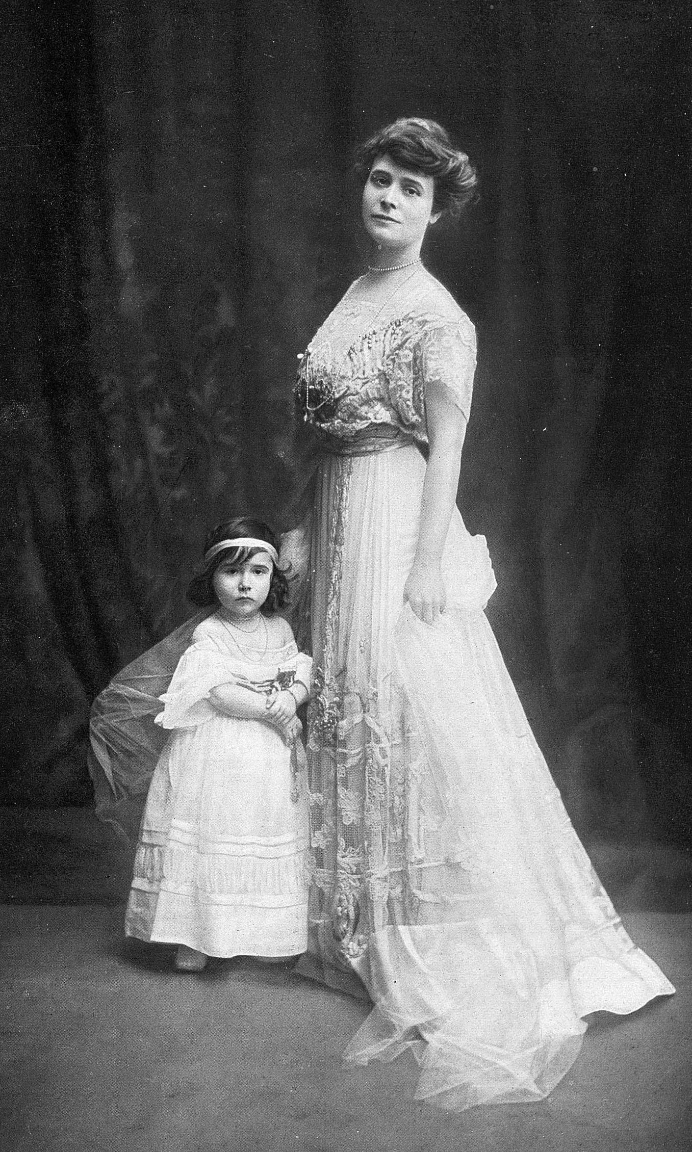 Louise Chéruit et sa fille Jacqueline, Photograph in Les Modes (cf. Roman d'une garde-robe, p. 174, note 9)